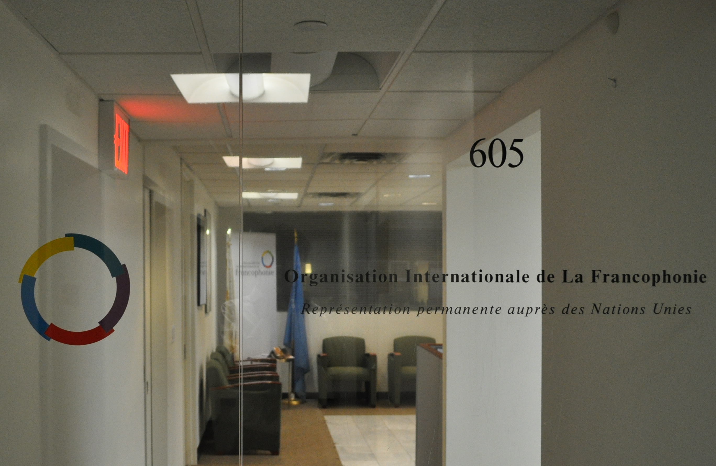 Entrée du siège de la RP de la Francophonie aux Nations unies à NYC.